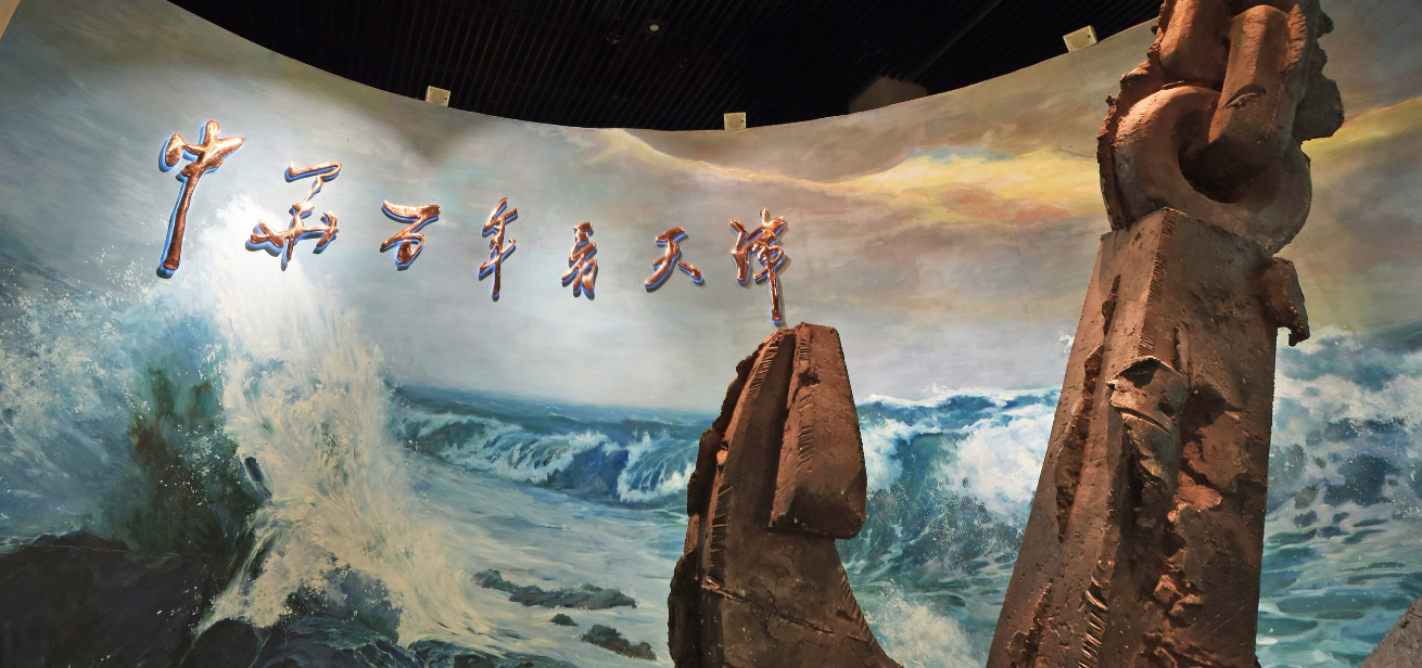 中文（中国大陆）: 天津博物馆 中华百年看天津